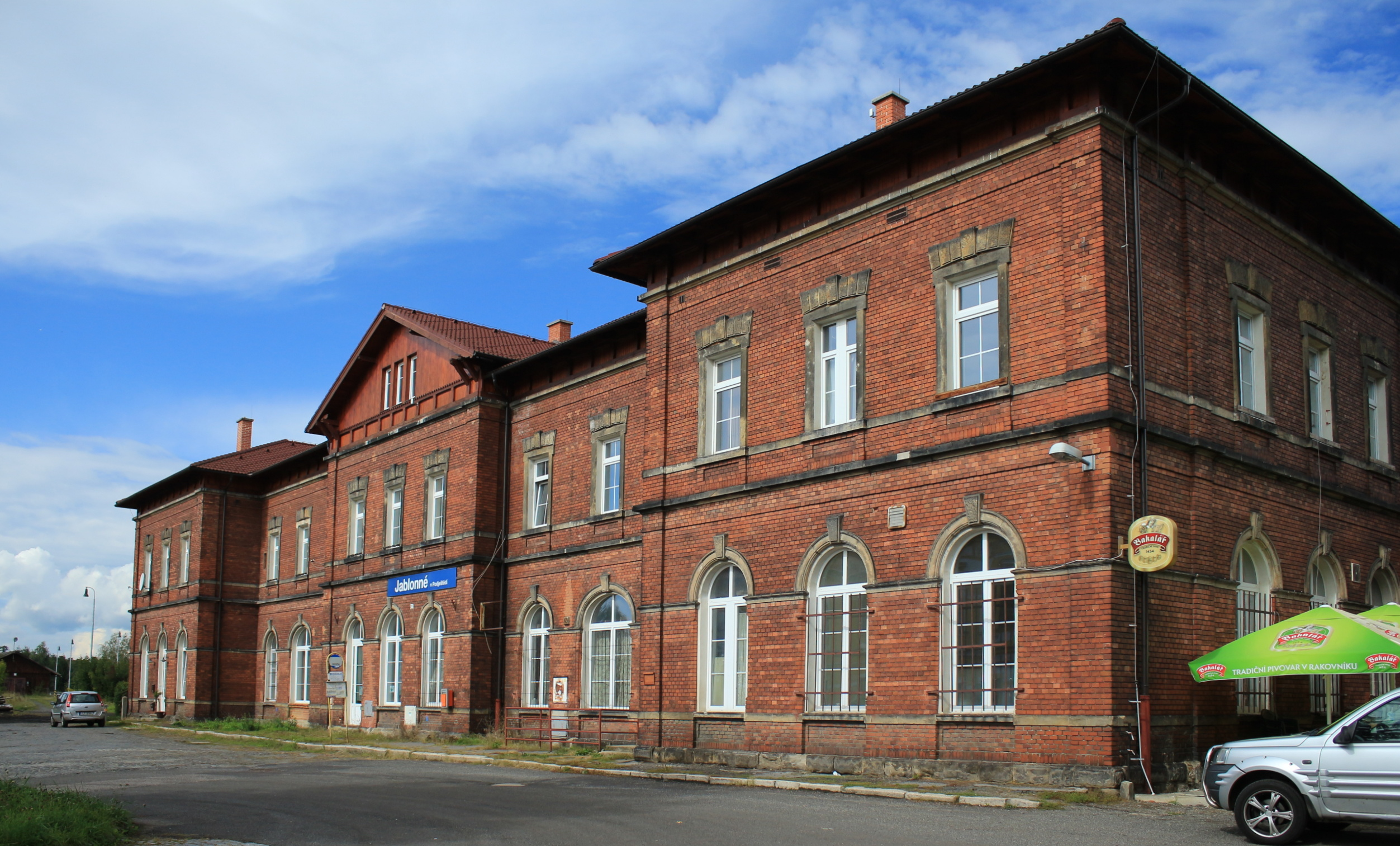 Železniční stanice Jablonné v Podještědí